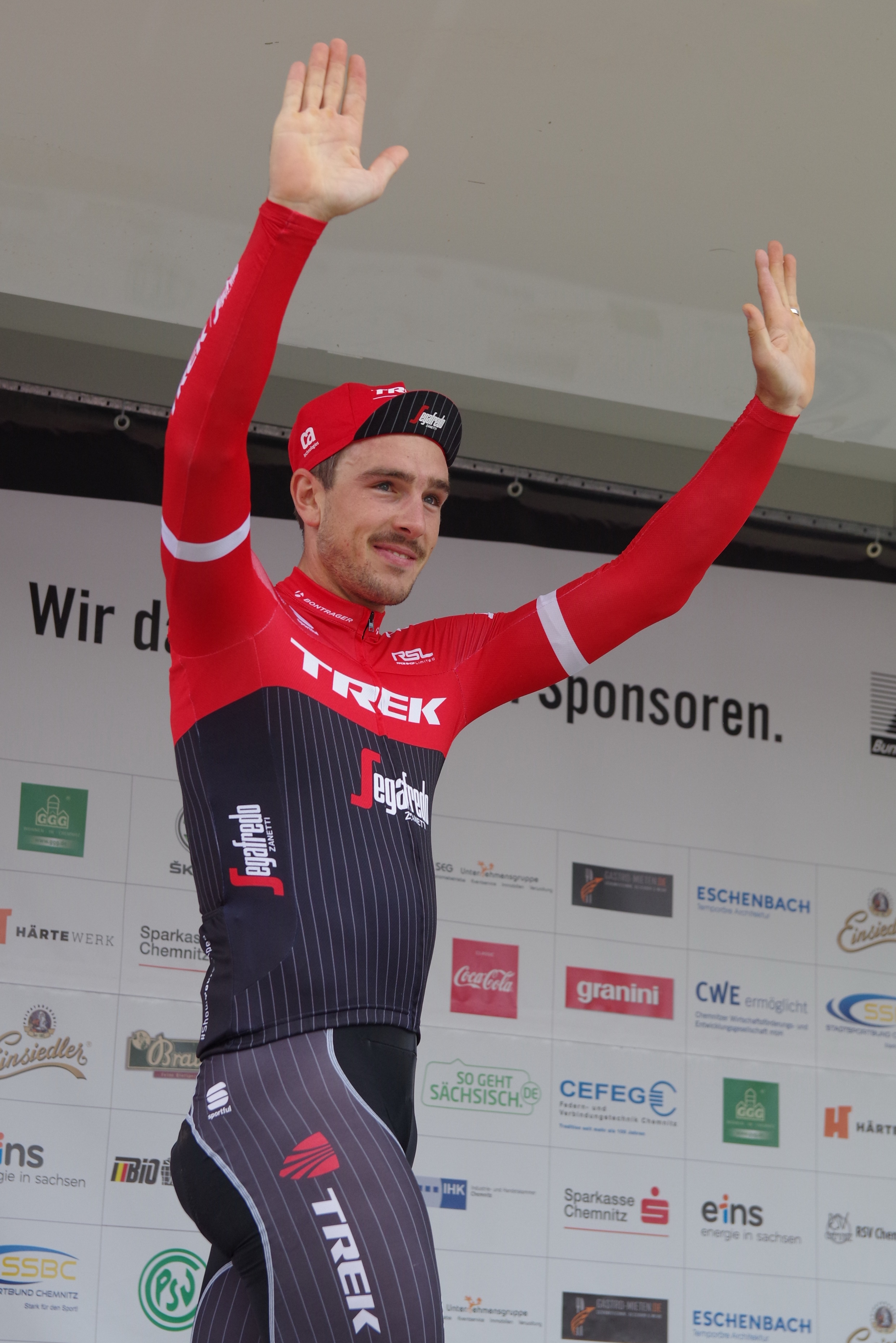 Deutsche Meisterschaften im Straßenrennen 2017 (Männer) 25. Juni 2017 Siegerehrung Platz 1: Marcus Burghardt Platz 2: Emanuel Buchmann Platz 3: John Degenkolb The making of this document was supported by the Community-Budget of Wikimedia Germany.